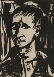 Bert Brecht